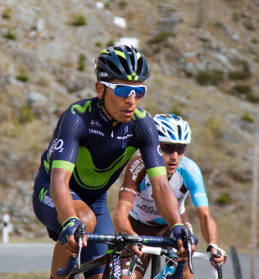 026 quintana